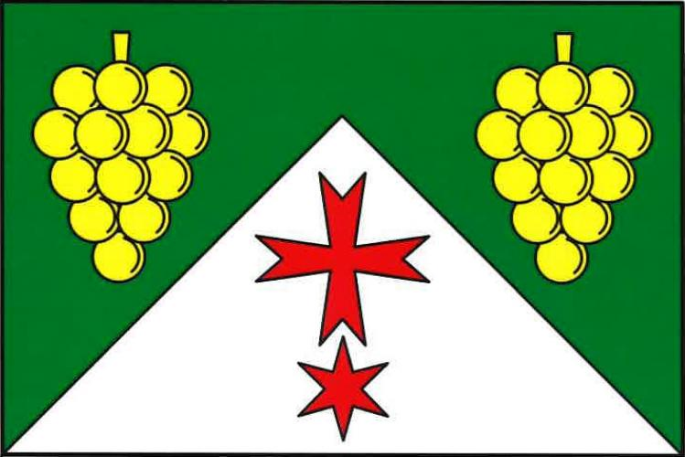 vlajka, Hodonice, okres Znojmo